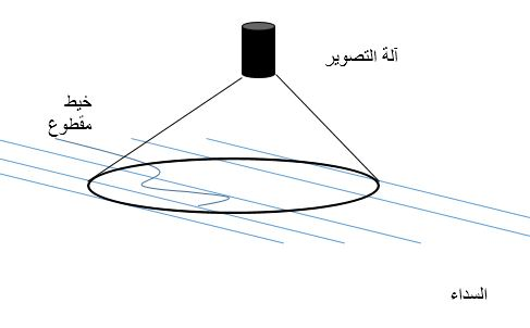 كشف الخيوط المقطوعة